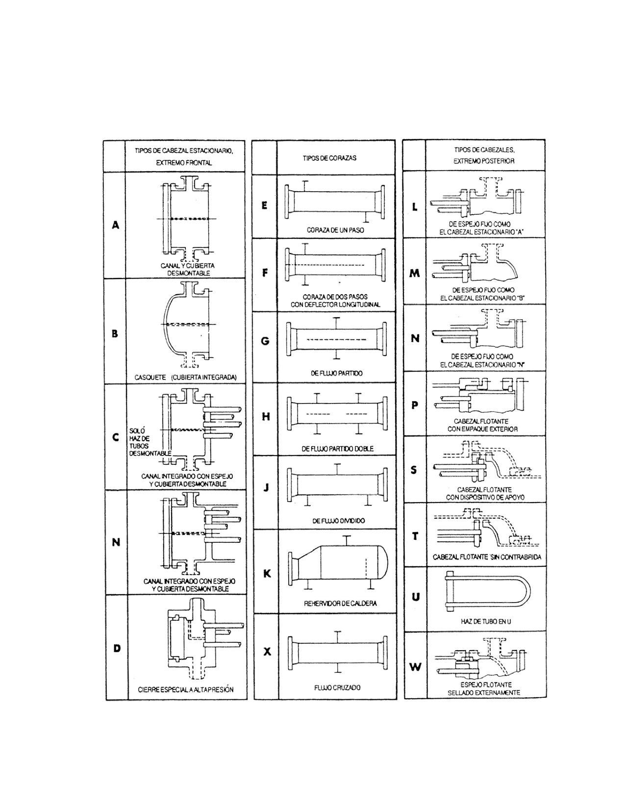 Configuraciones Standard de Intercambiadores de Calor de Carcasa y Tubos. Nomenclatura segun Tubular Exchangers Manufacturers Asociation.